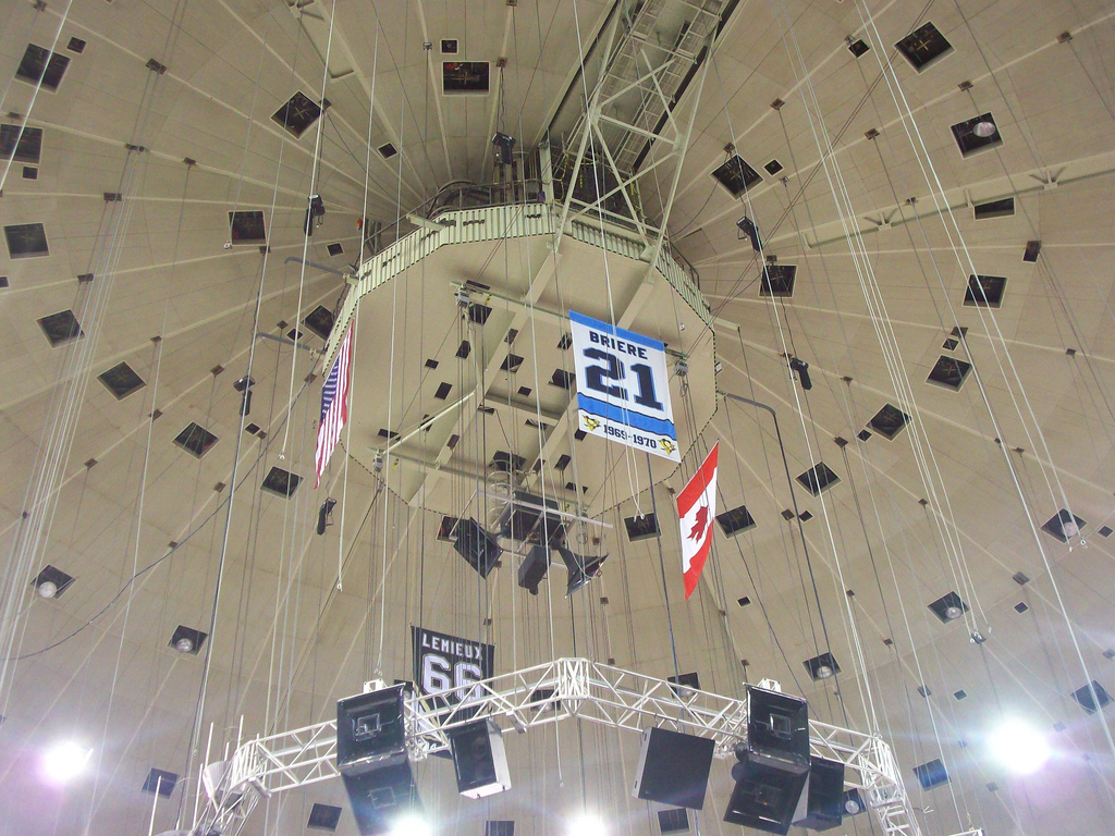 MELLON ARENA BANNERS